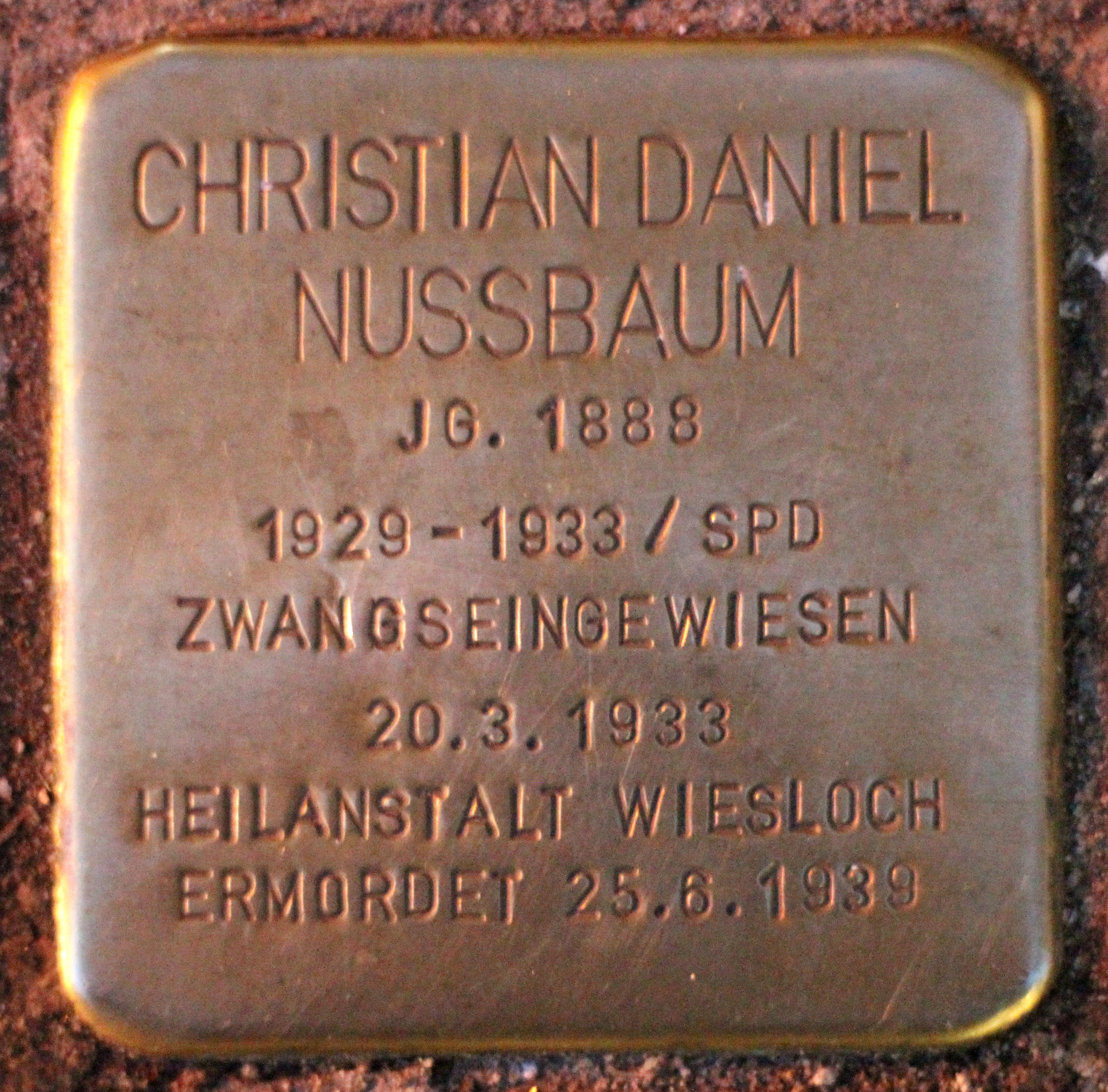 Bildinhalt: Stolperstein Ständehausstraße 2, Christian Daniel Nussbaum Aufnahmeort: Karlsruhe, Deutschland